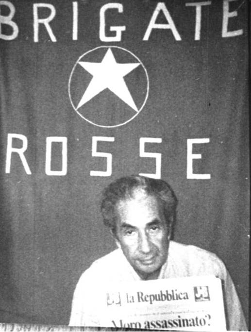 La seconda foto di Aldo Moro ostaggio delle BR